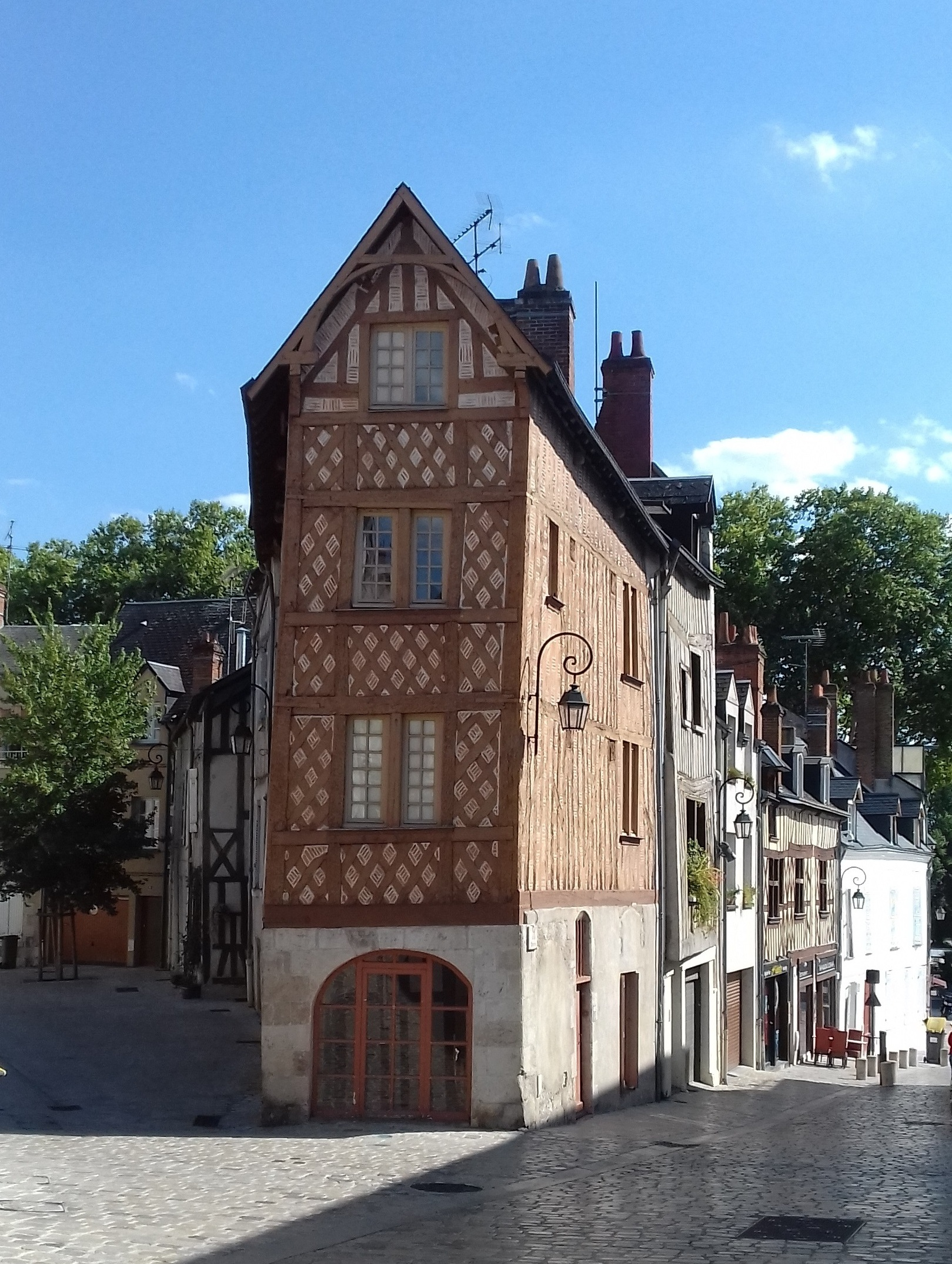 Maisons à colombages Orléans